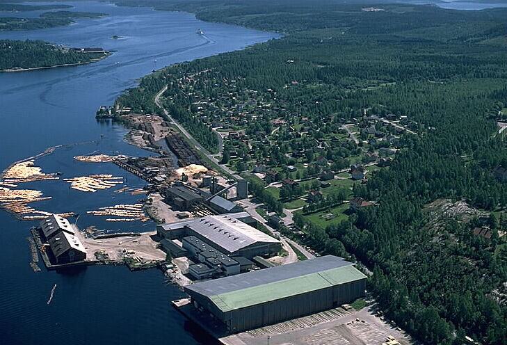 Motiv: Domsjö Nyckelord: Flygbilder Kategori: Sågverk Domsjö